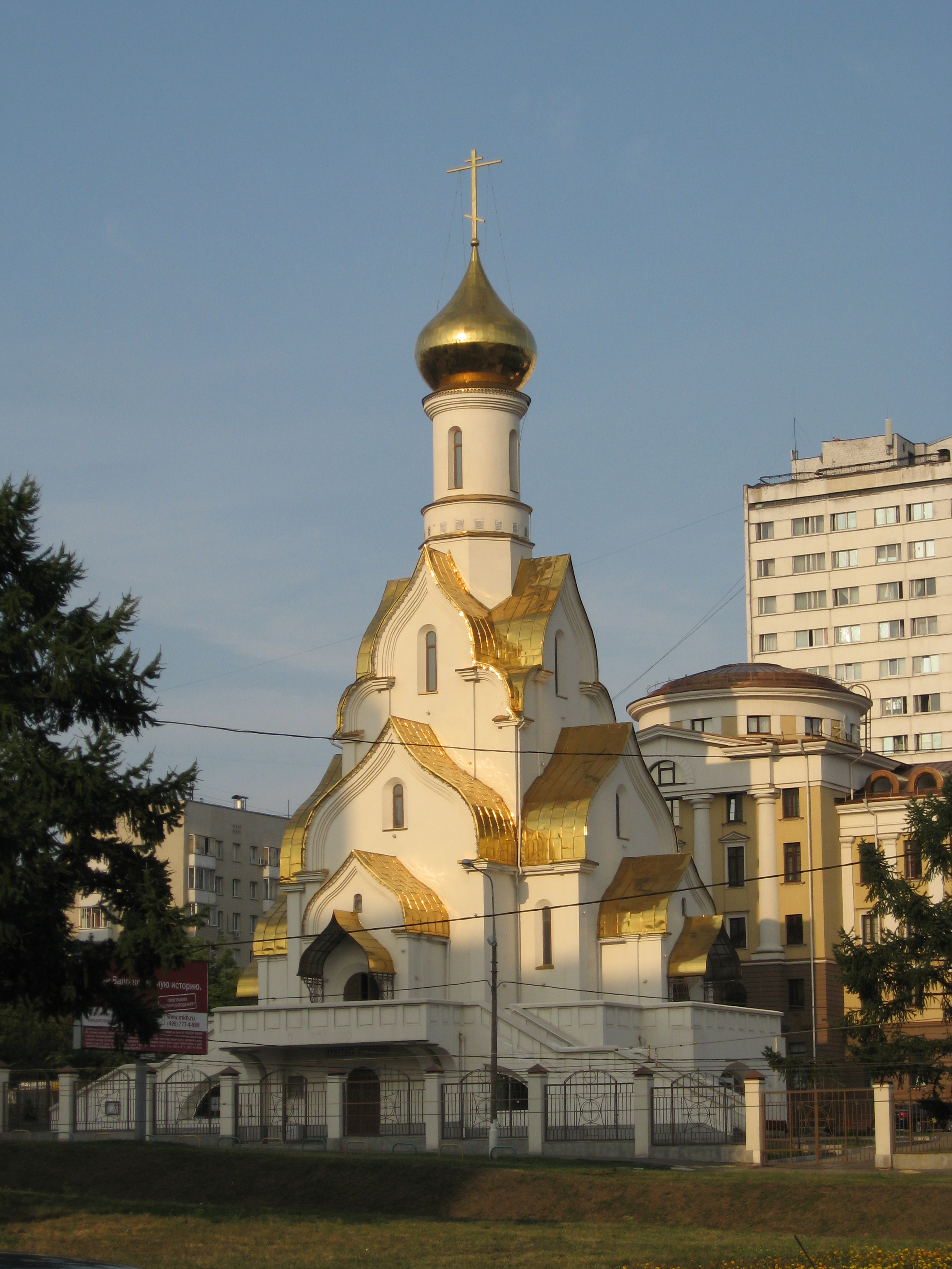 Храм святого благоверного князя Александра Невского в Кожухове